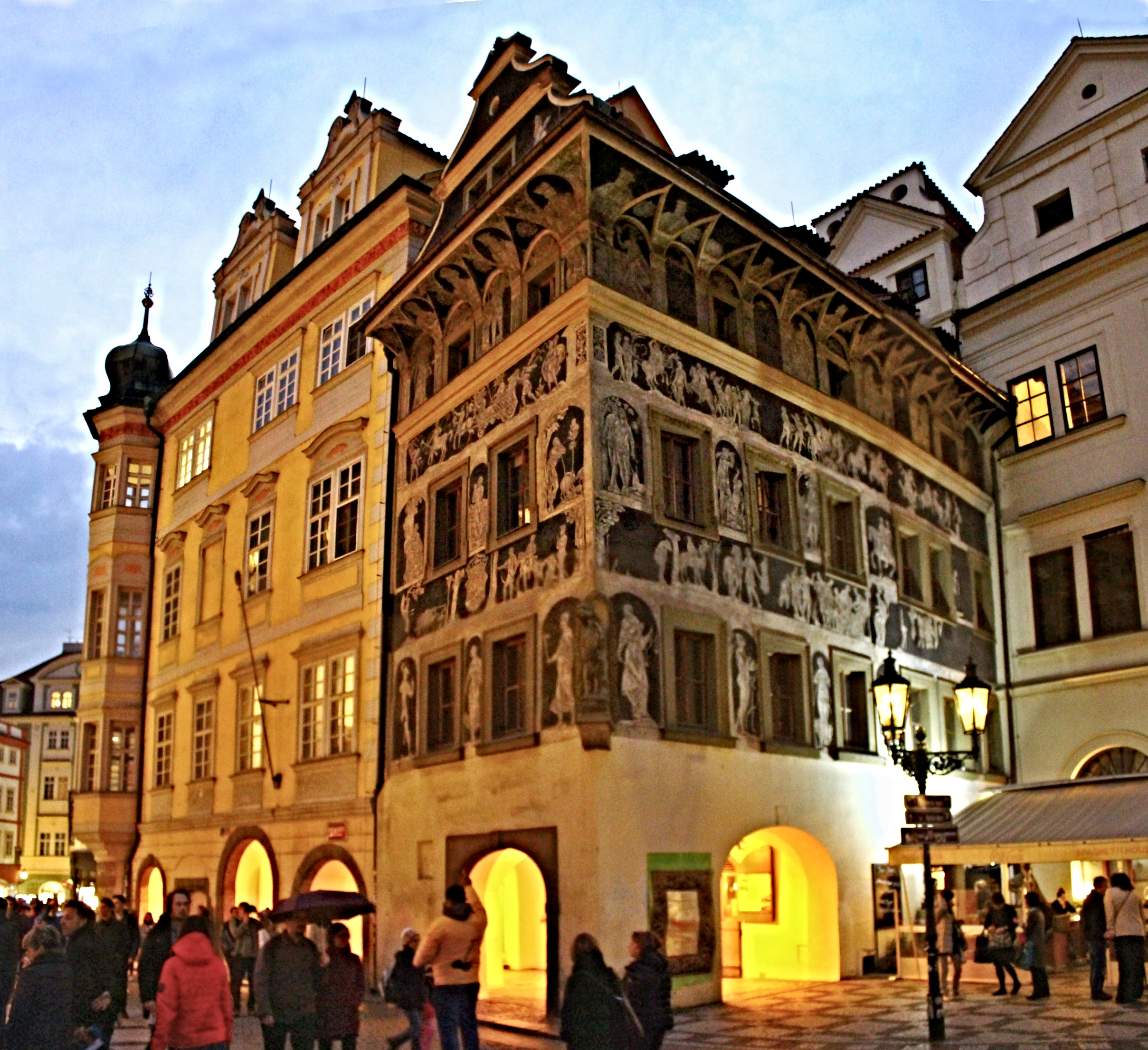 Dům U Minuty